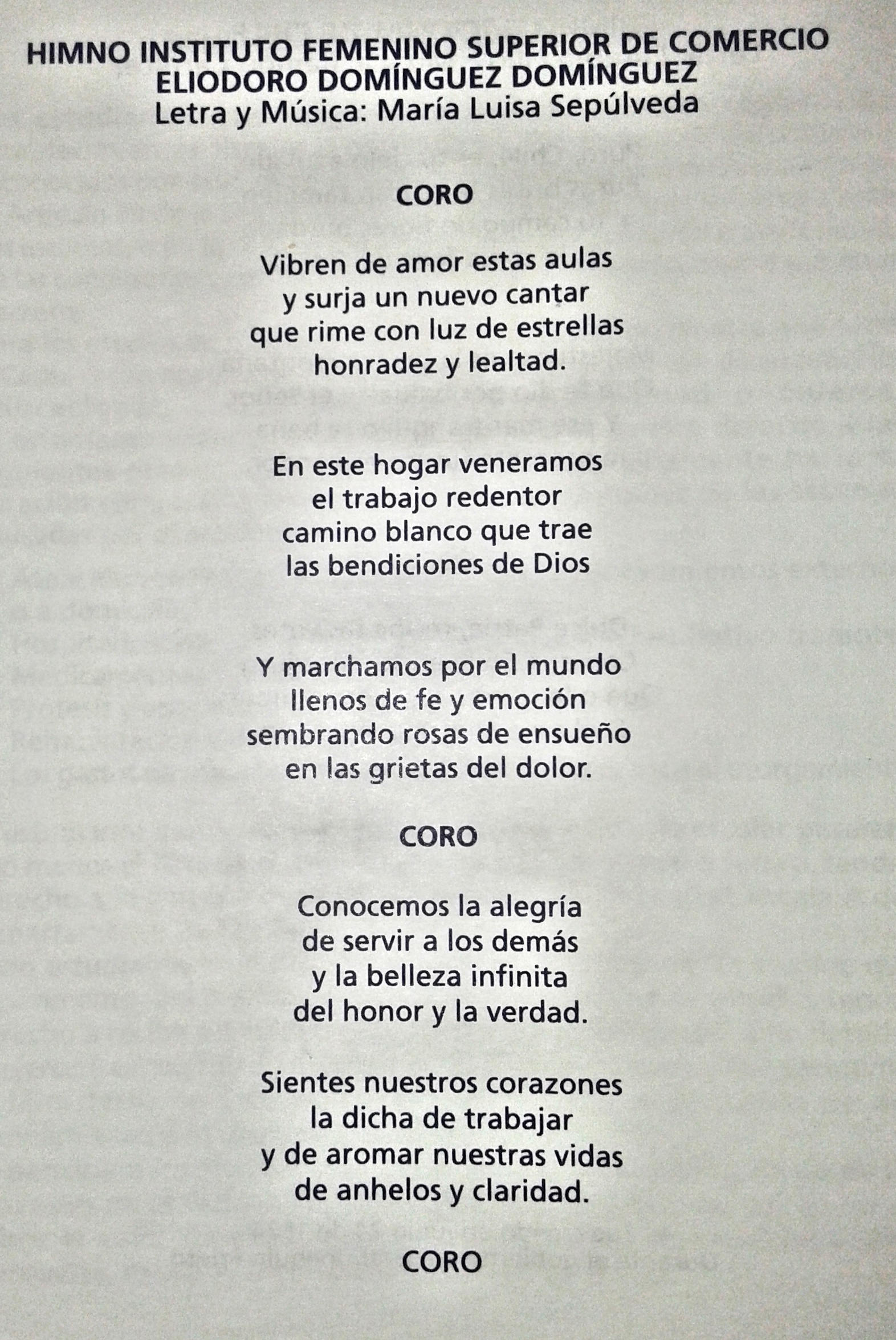 Himno del Instituto Femenino Superior de Comercio, escrito por María Luisa Sepúlveda.